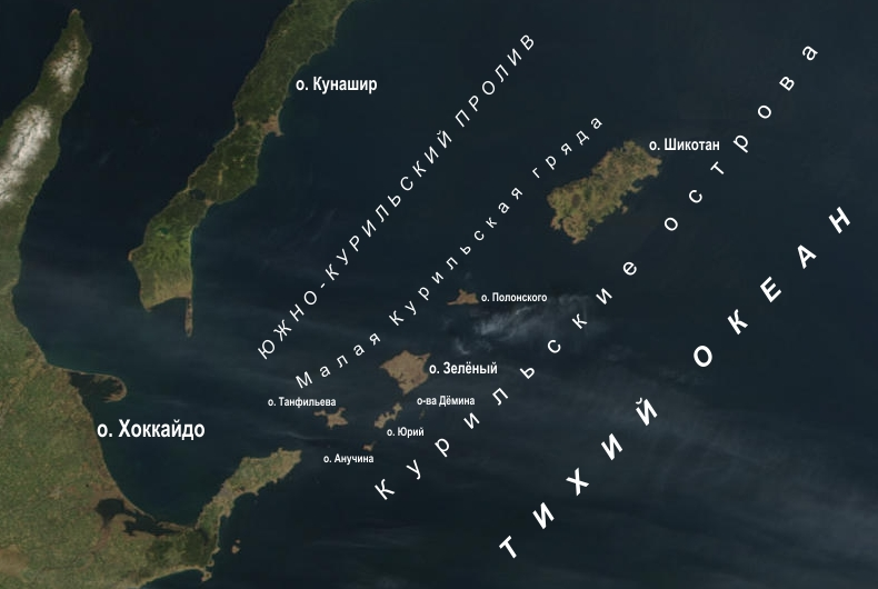 Фотокарта Малой Курильской гряды Курильских островов на основе космического снимка НАСА